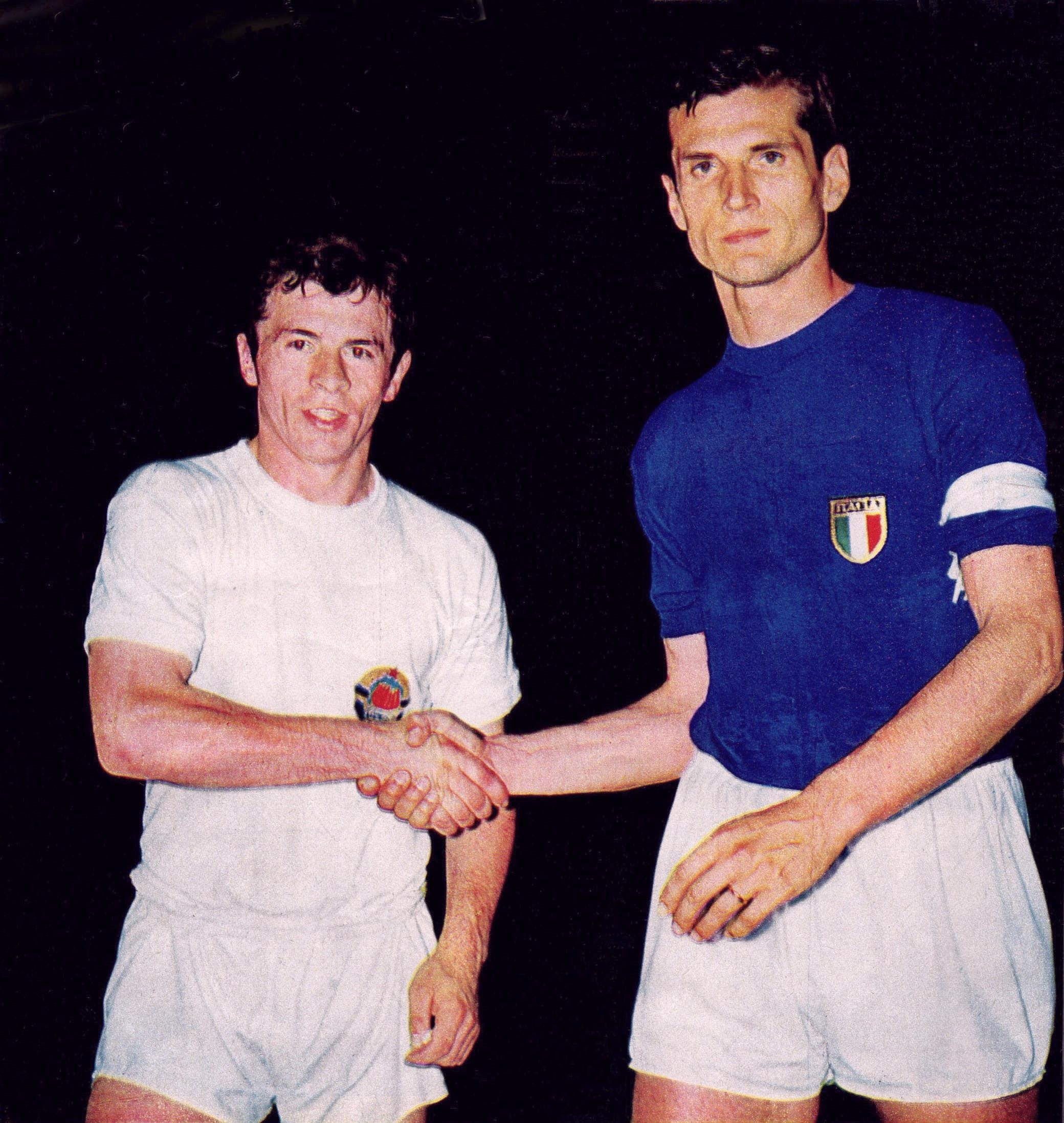 Roma (Italia), stadio Olimpico, 8 o 10 giugno 1968. Da sinistra: il centrocampista jugoslavo Ilija Petković e il terzino italiano Giacinto Facchetti in occasione della finale del campionato d'Europa 1968 tra Italia e Jugoslavia (1-1 d.t.s.; 2-0 ripetizione).